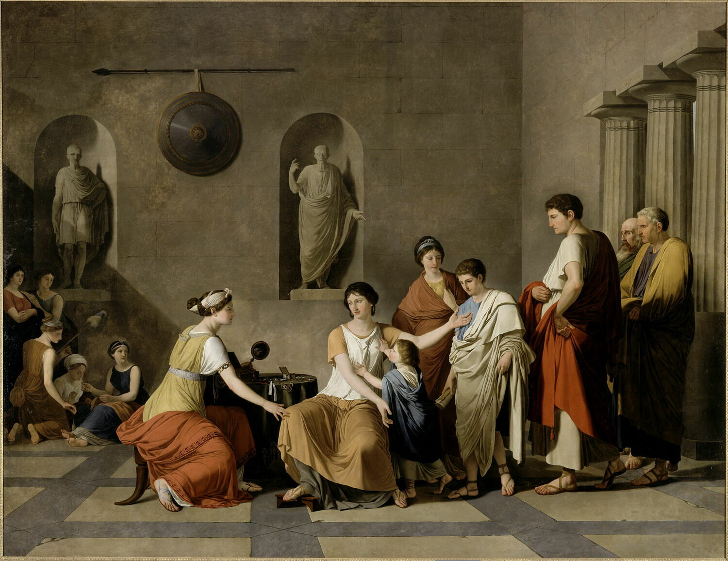 Cornelia, madre dei Gracchititle QS:P1476,it:"Cornelia, madre dei Gracchi" label QS:Lit,"Cornelia, madre dei Gracchi"